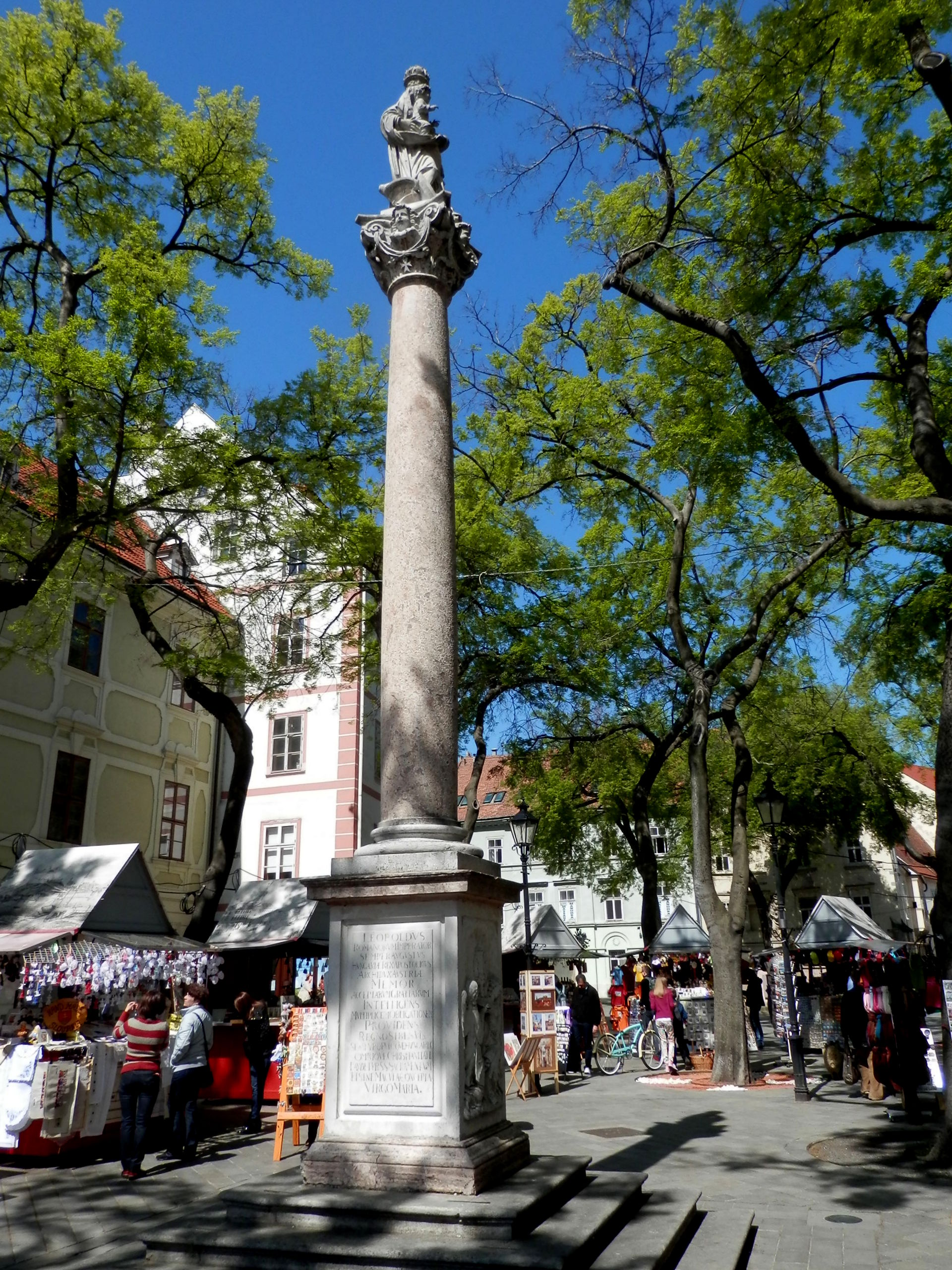 Mariánsky stĺp na Františkánskom námestí. Bratislava.